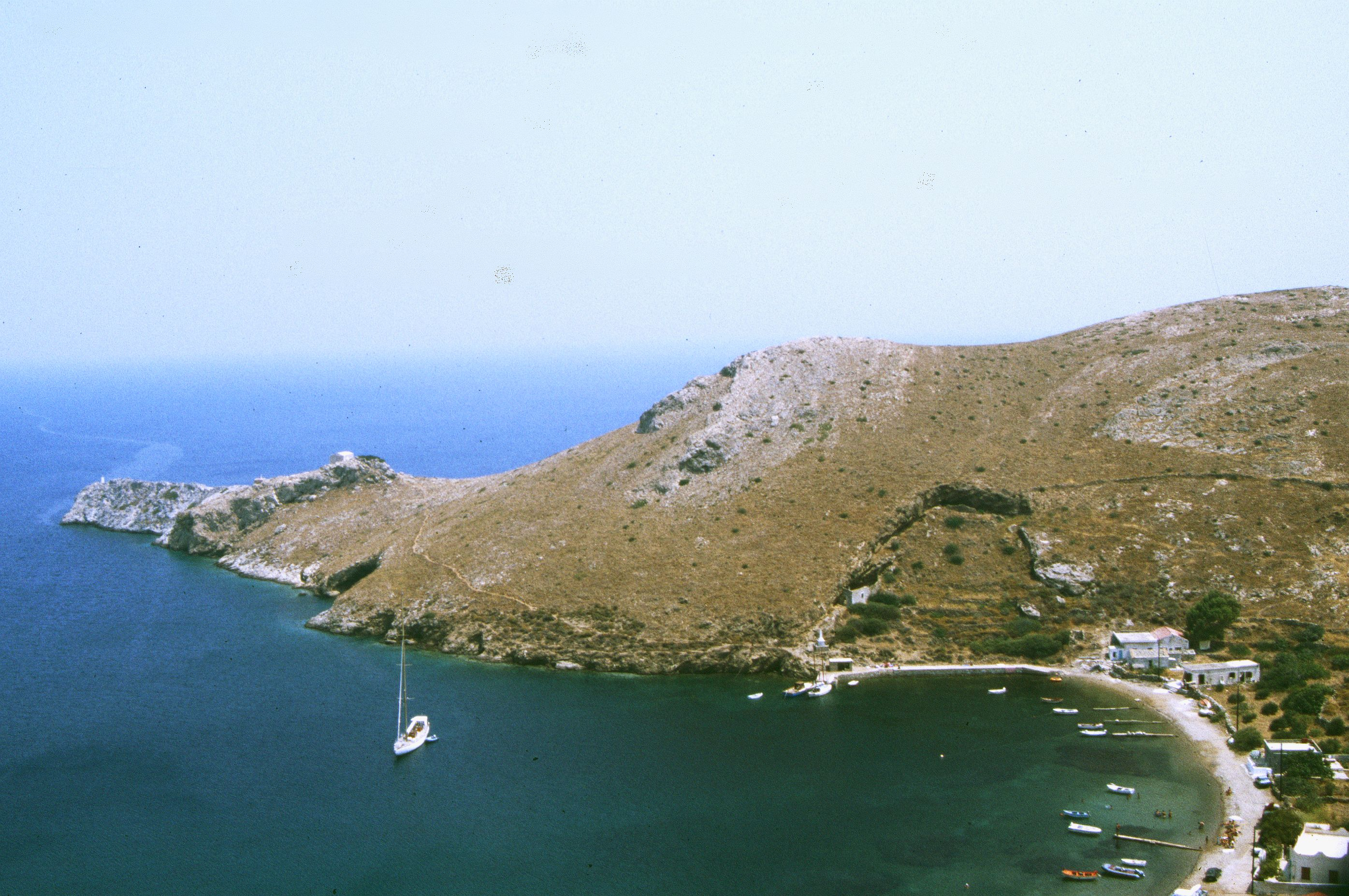 Mani: Kap Teneron